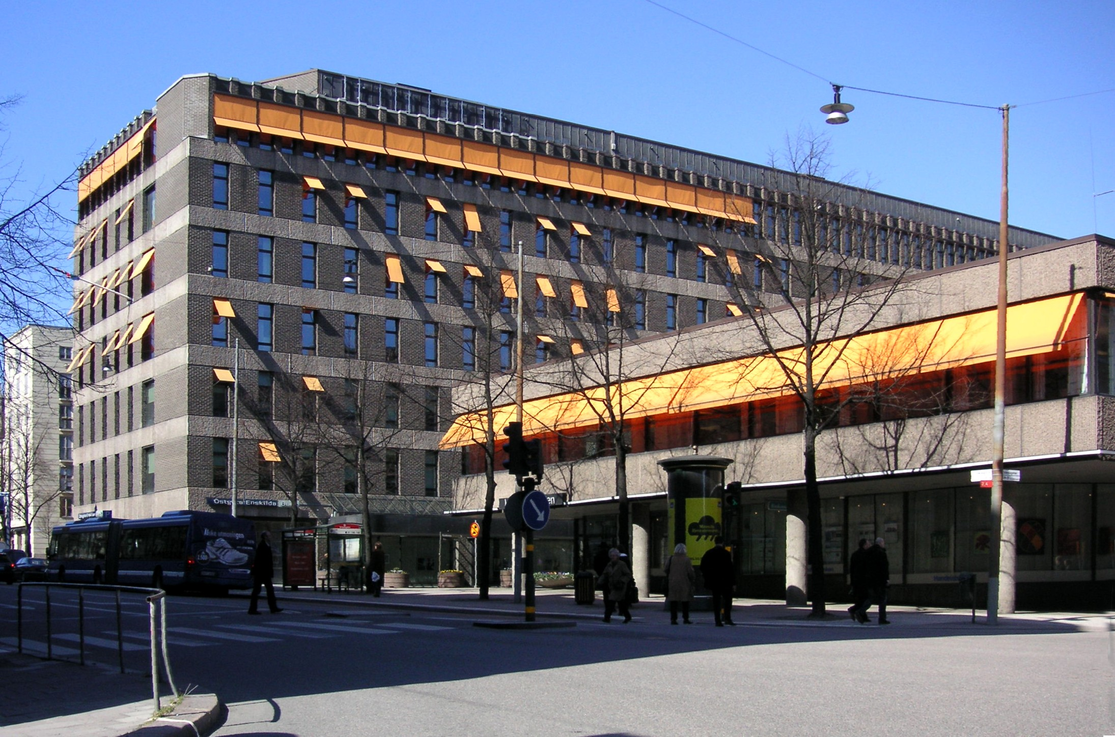 Anders Tengbom byggnad för "Trygg Hansa" vid Fleminggatan i Stockholm